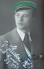 Porträtfotografie von Wolfram Hucke als Corpsbursche der Hasso-Nassovia